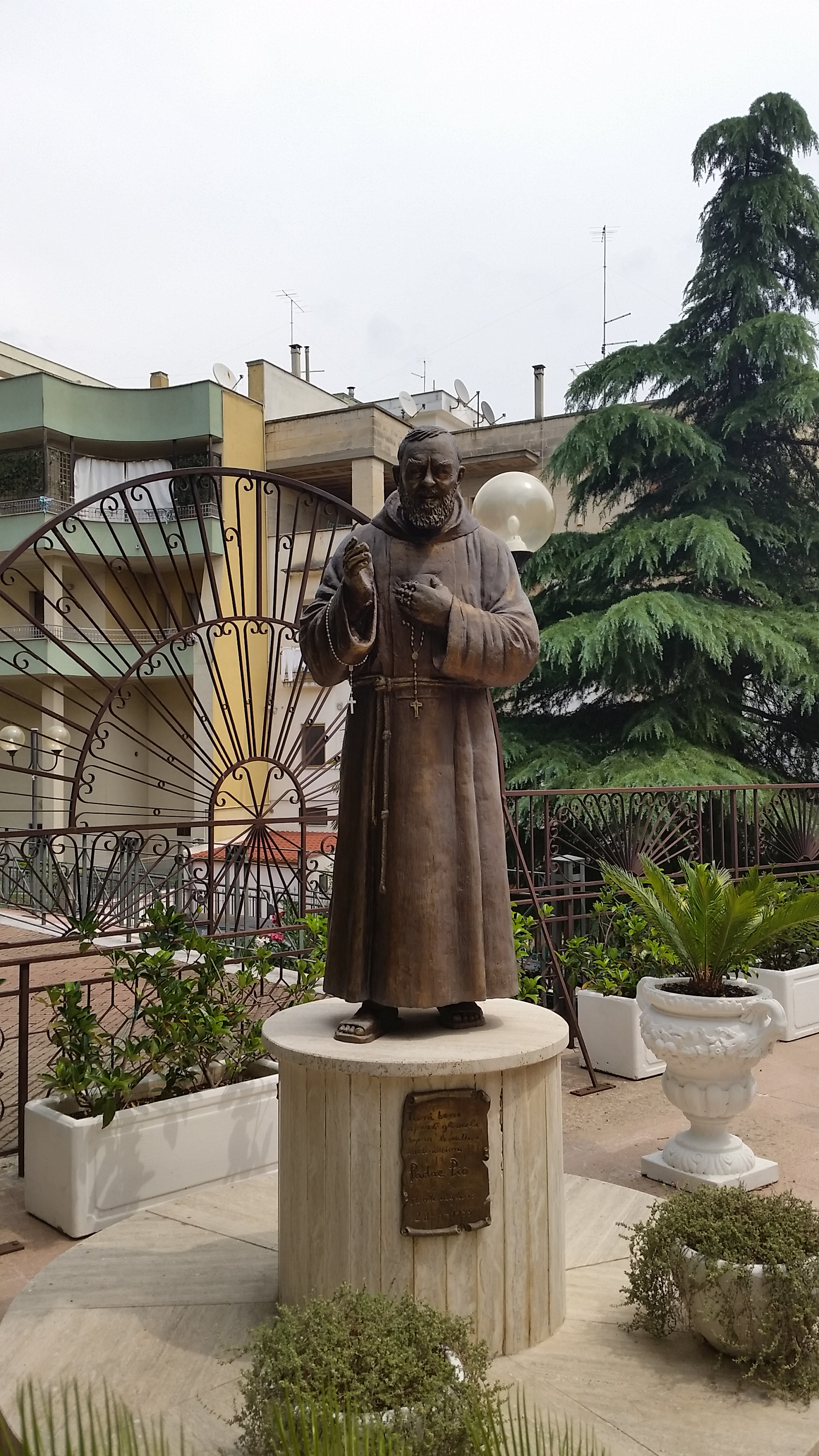 Statua di Padre Pio a Montescaglioso